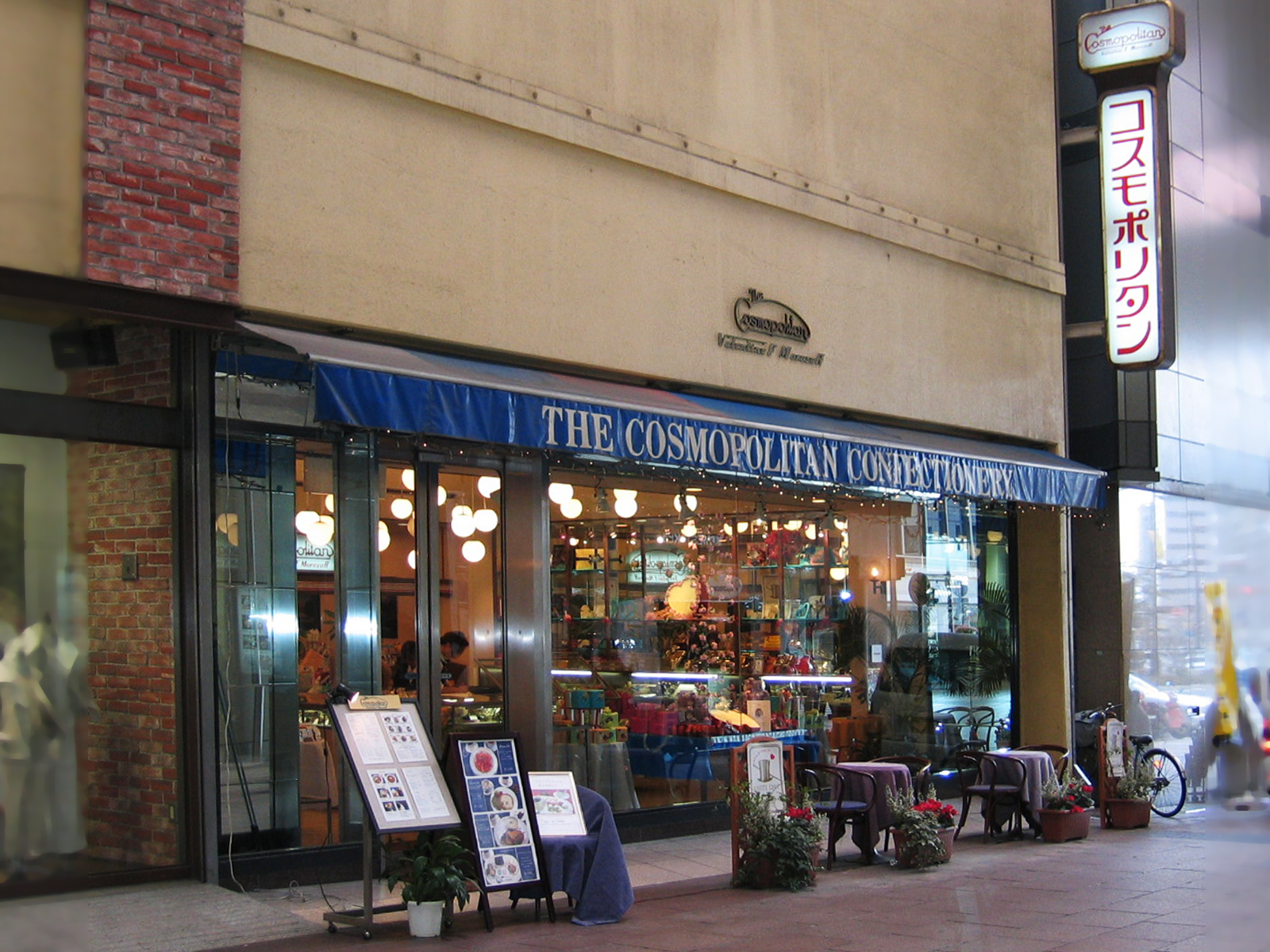 コスモポリタン製菓